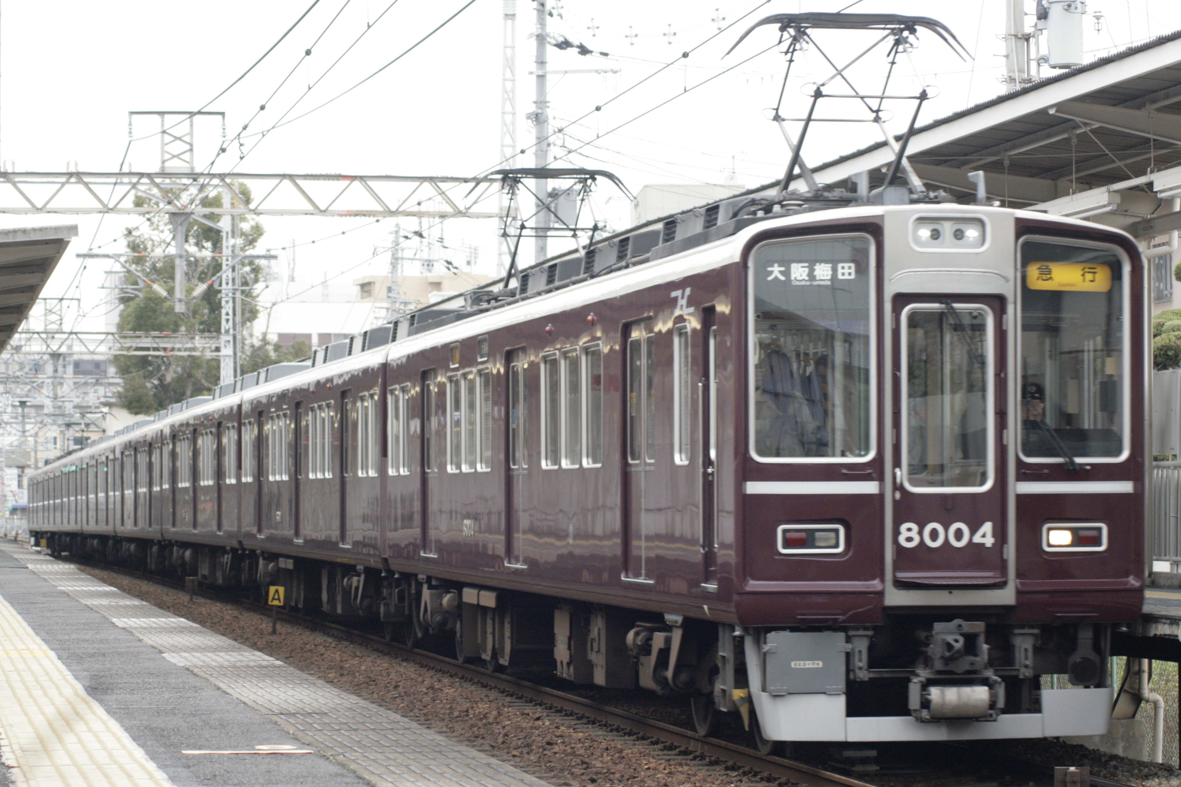 2019年12月21日 服部天神駅にて撮影。